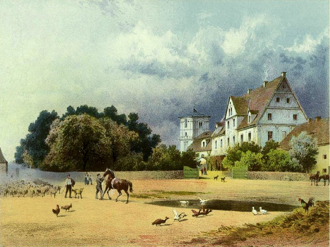 Rittergut Jordansmühl, Kreis Nimptsch